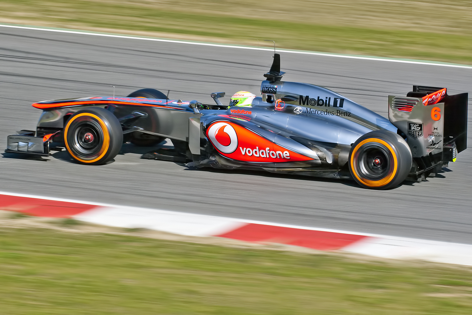 F1 Tests - Circuit de Catalunya, Spain.